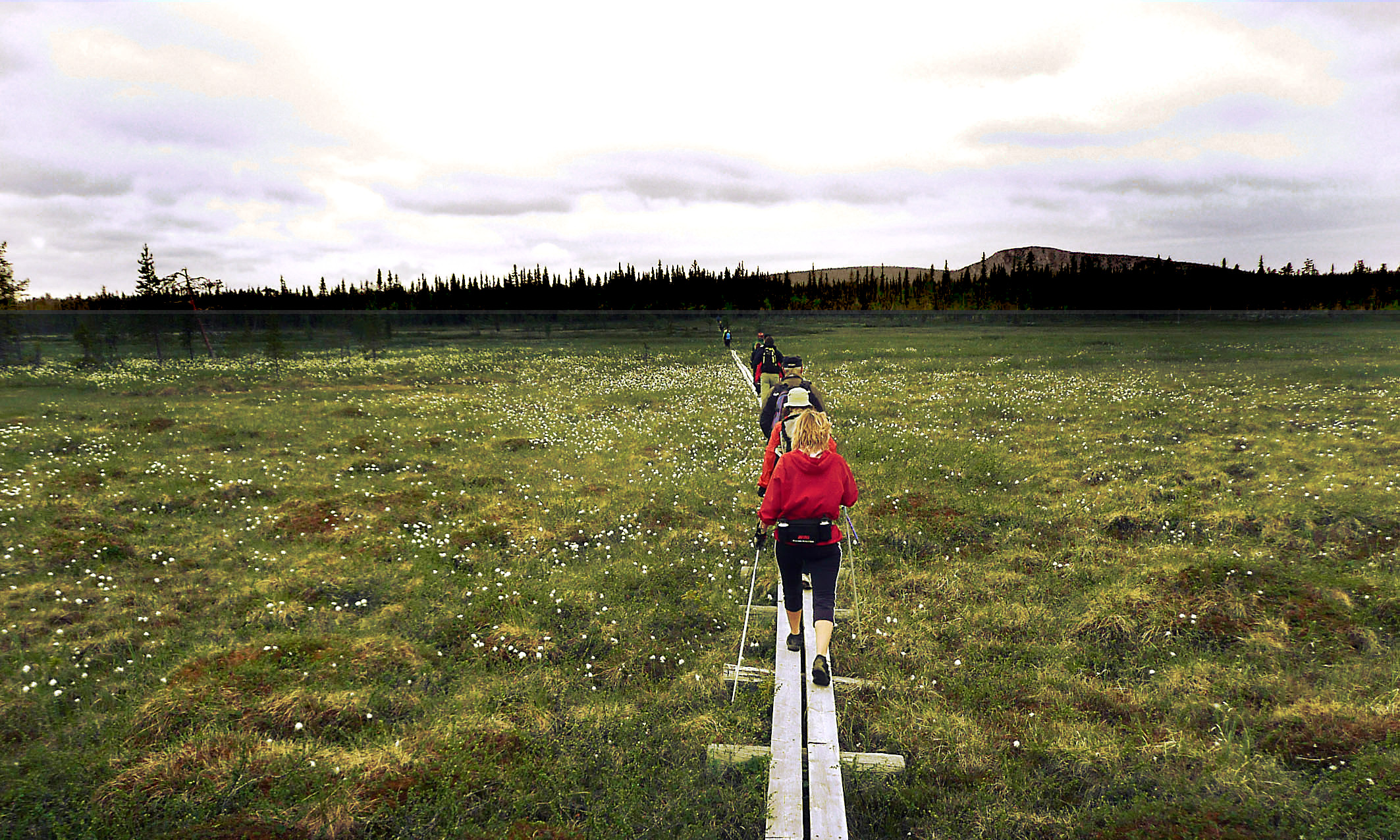 Muddus fruktade myrar en del av den fantastiska Rallarmarschen mellan Gällivare och Porjus. 4,4 mil över myrar, genom urskog och upp för det björnrika Hapsaberget. Stigen där tysta starka män bar material till det stora kraftverksbygget i Porjus i början av 1900-talet